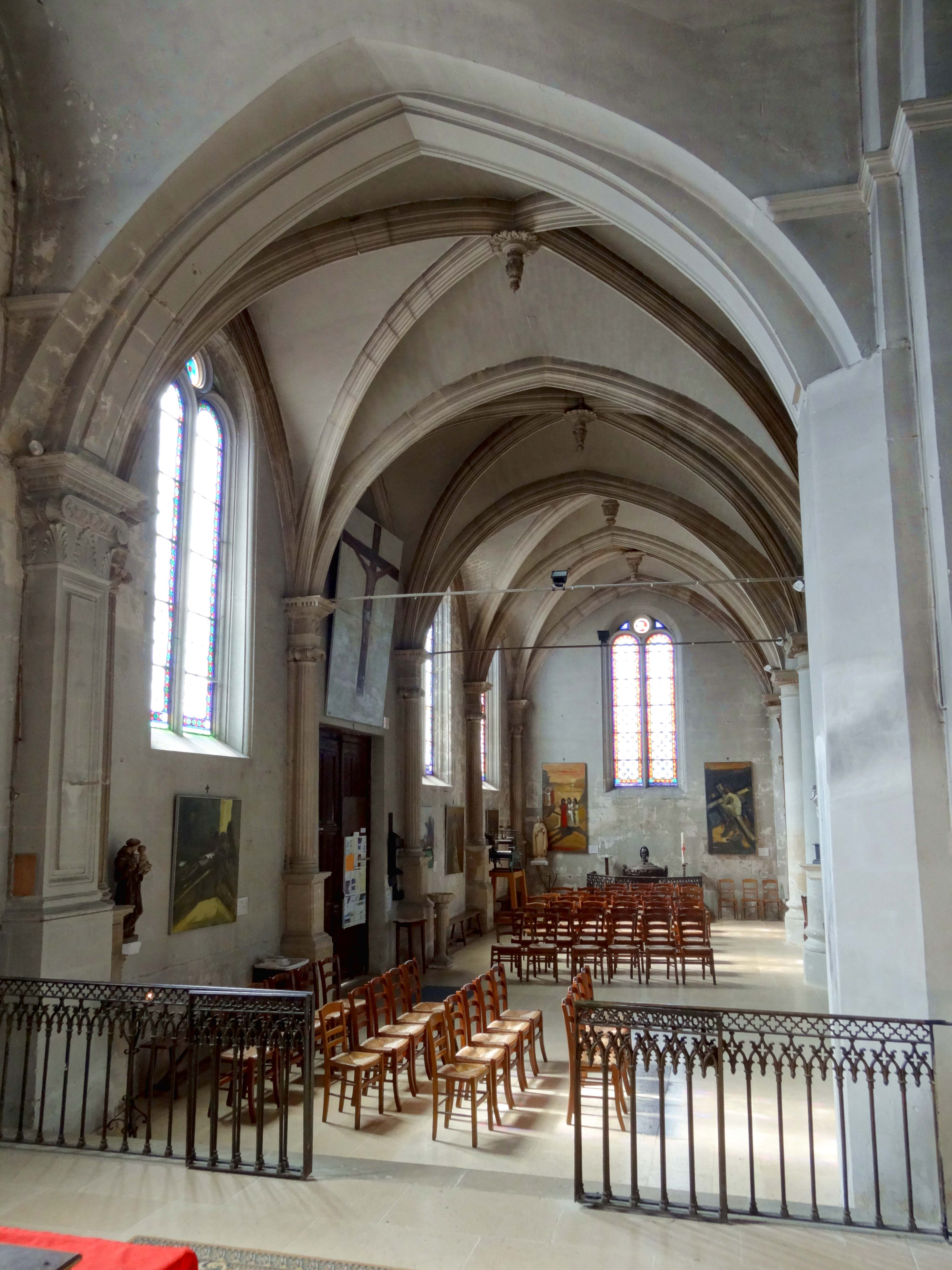 Intérieur de l'église - voir titre.